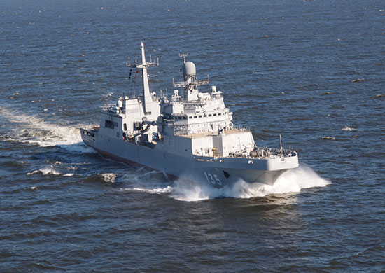 Головной корабль серии проекта 11711 "Иван Грен"